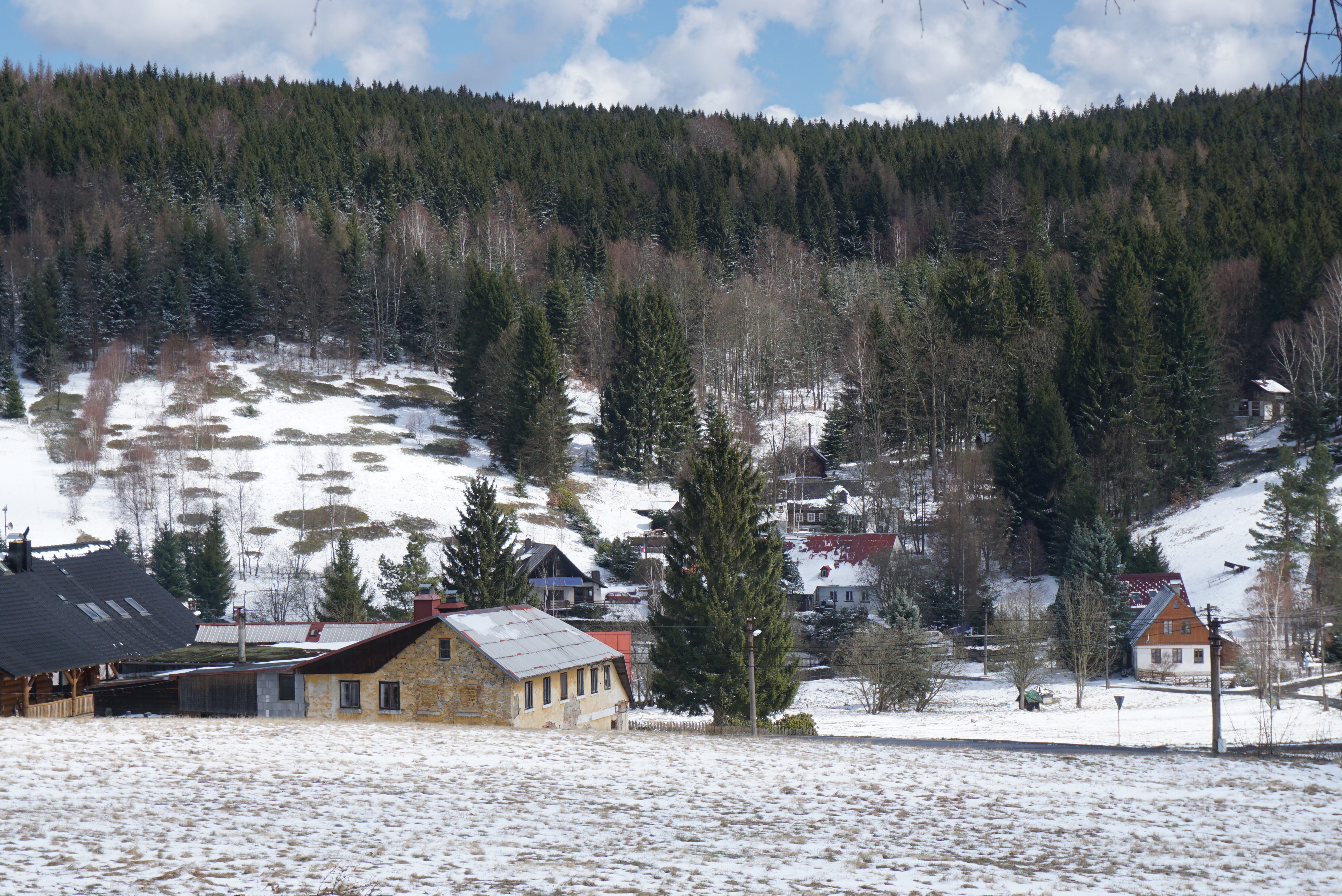 Rudolfov (Liberec XXI) - pohled na střed vsi od jihovýchodu, od hřbitova